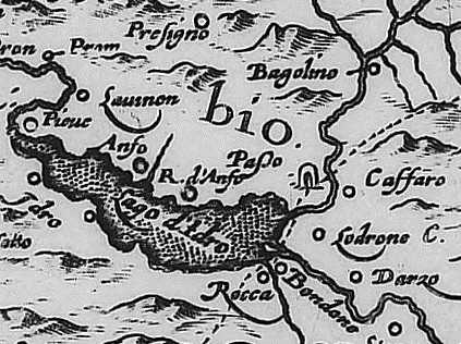 zoom on Lake Idro